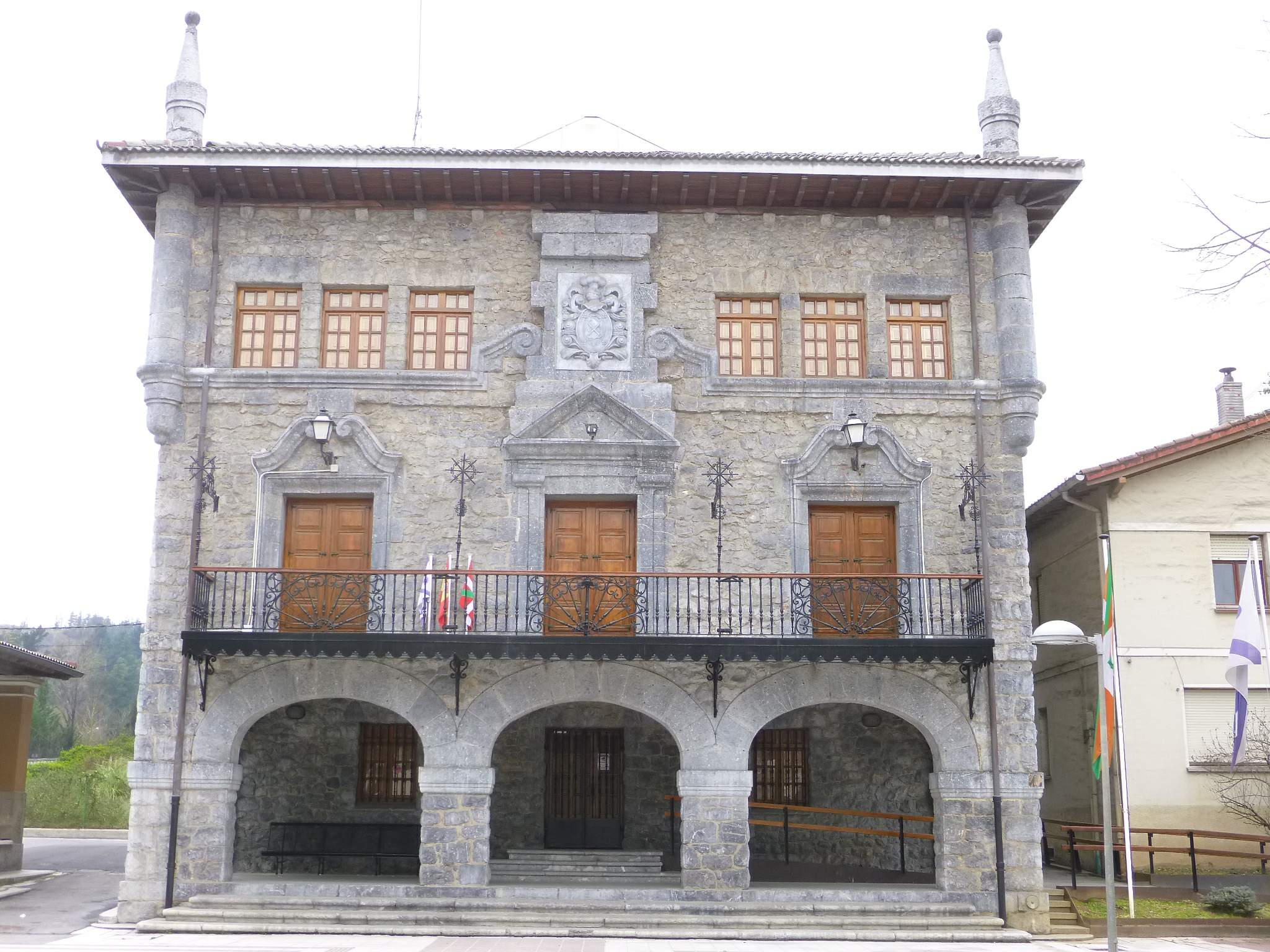 Ayuntamiento de Lemoa (Bizkaia)